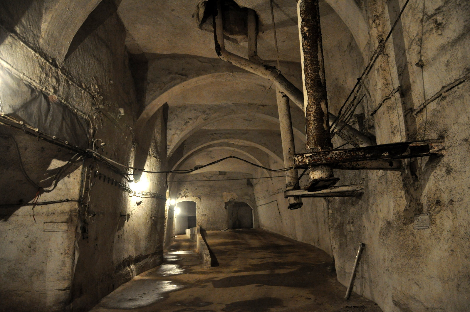 Kőbánya limestone mine